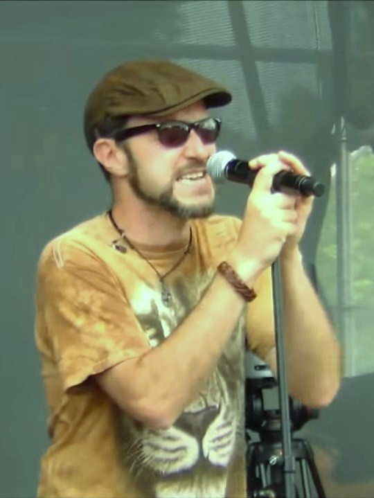 Zbigniew Fil, wokalista i instrumentalista.